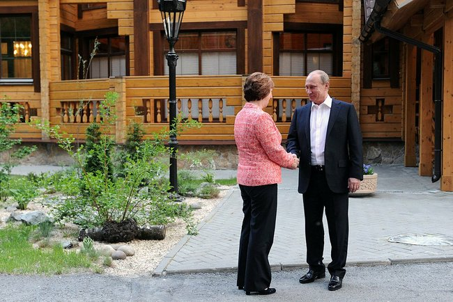 Перед началом неформального обеда. С Верховным представителем Европейского союза по иностранным делам и политике безопасности Кэтрин Эштон